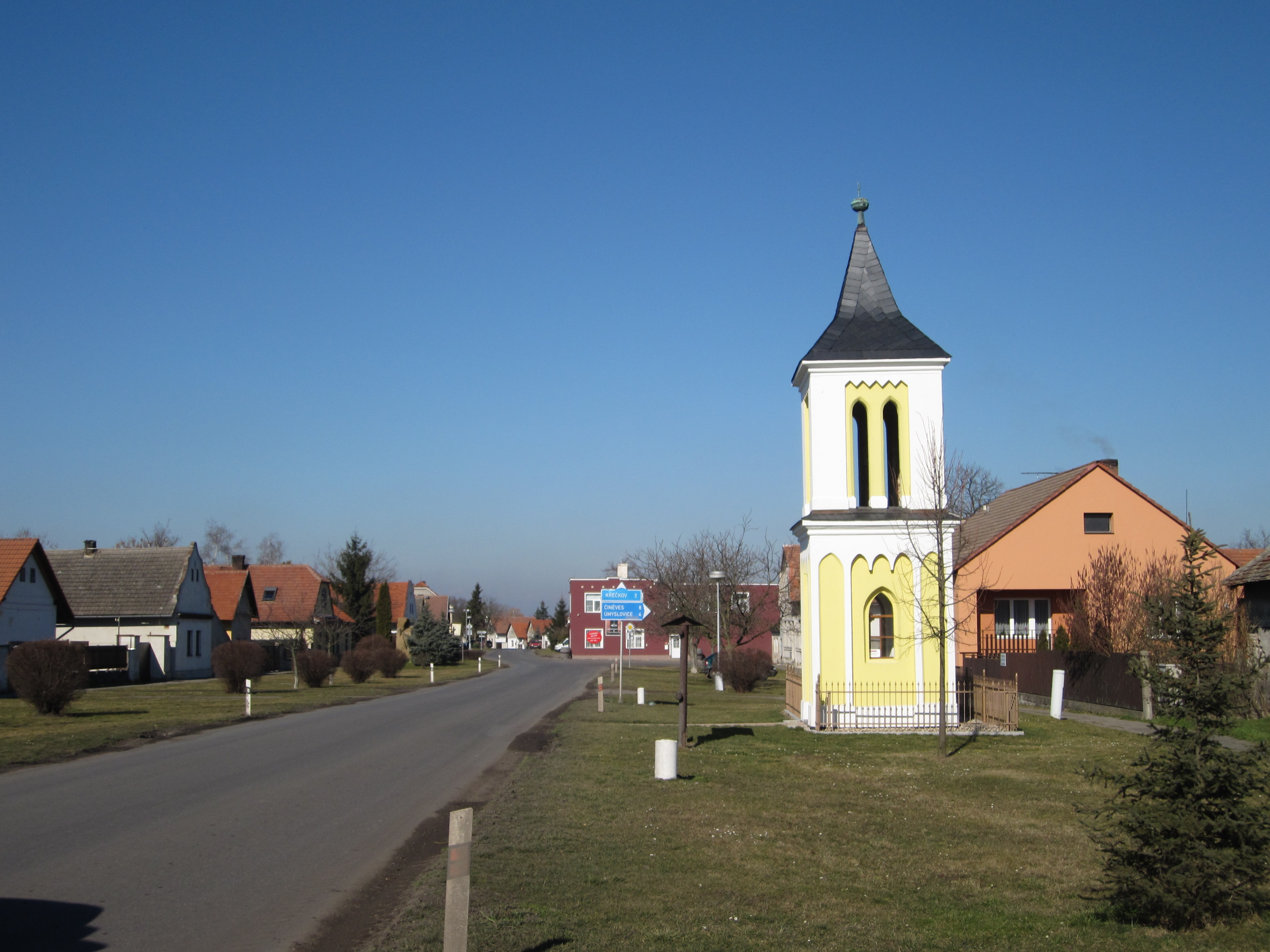 Pátek